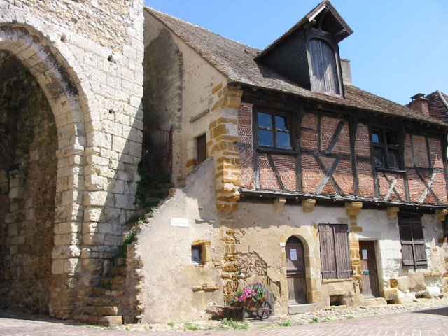 Maison à colombages du XVIe siècle, à Mennetou-sur-Cher (Loir-et-Cher, France). It is indexed in the Base Mérimée, a database of architectural heritage maintained by the French Ministry of Culture, under the references PA00098480 and IA00012753.